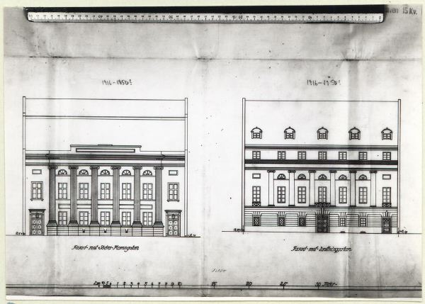 Frimurarlogen, fasader mot Södra Hamngatan och Drottninggatan, ritning av Ernst Torulf 1915. Bildsamlingen i Göteborgs stadsmuseum.